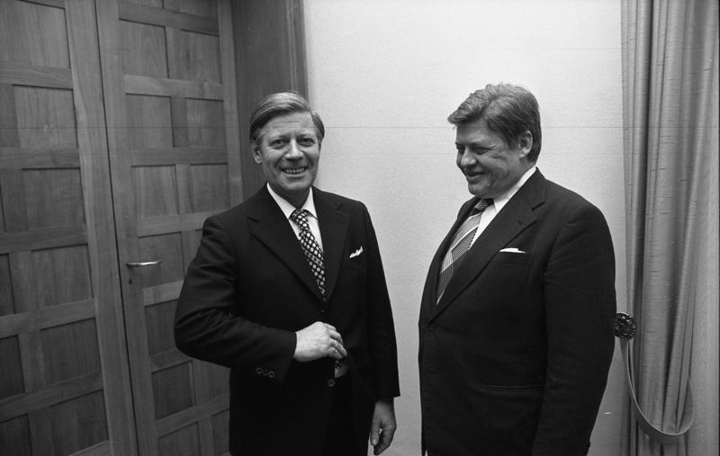 Bundeskanzler Helmut Schmidt empfängt Arbeitgeberpräsident Hanns Martin Schleyer